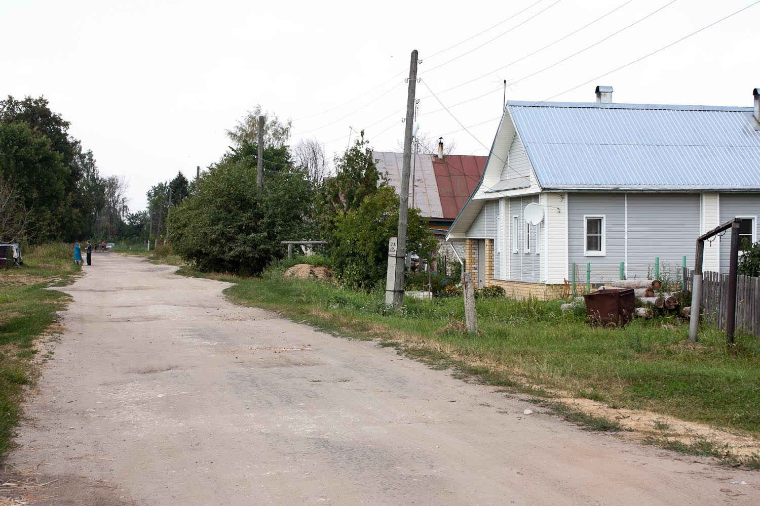 д.Олтушево (2010.07.25)